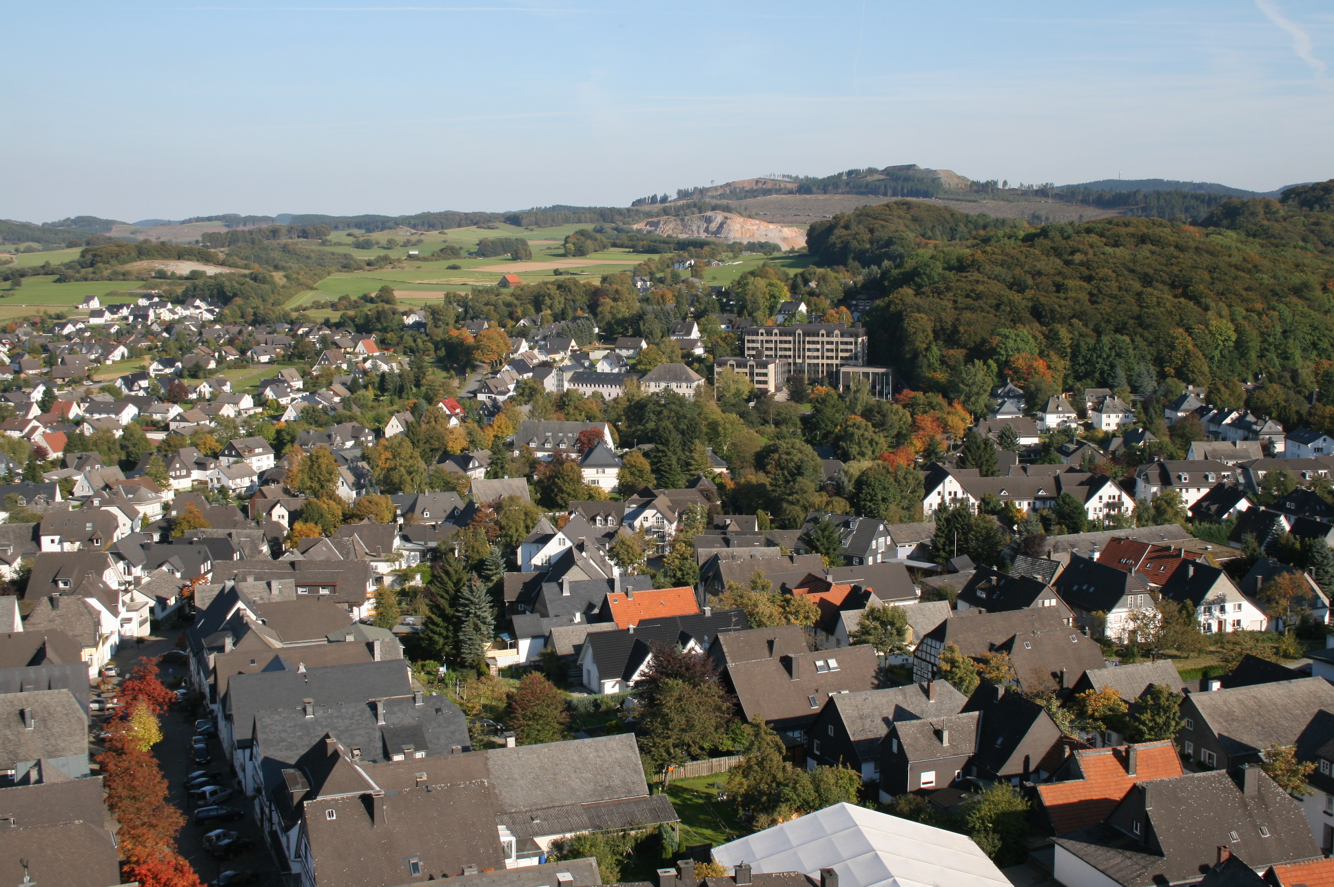 Blick aus dem Turm der Propsteikirche St. Petrus und Andreas in Brilon (Richtung Bilstein).